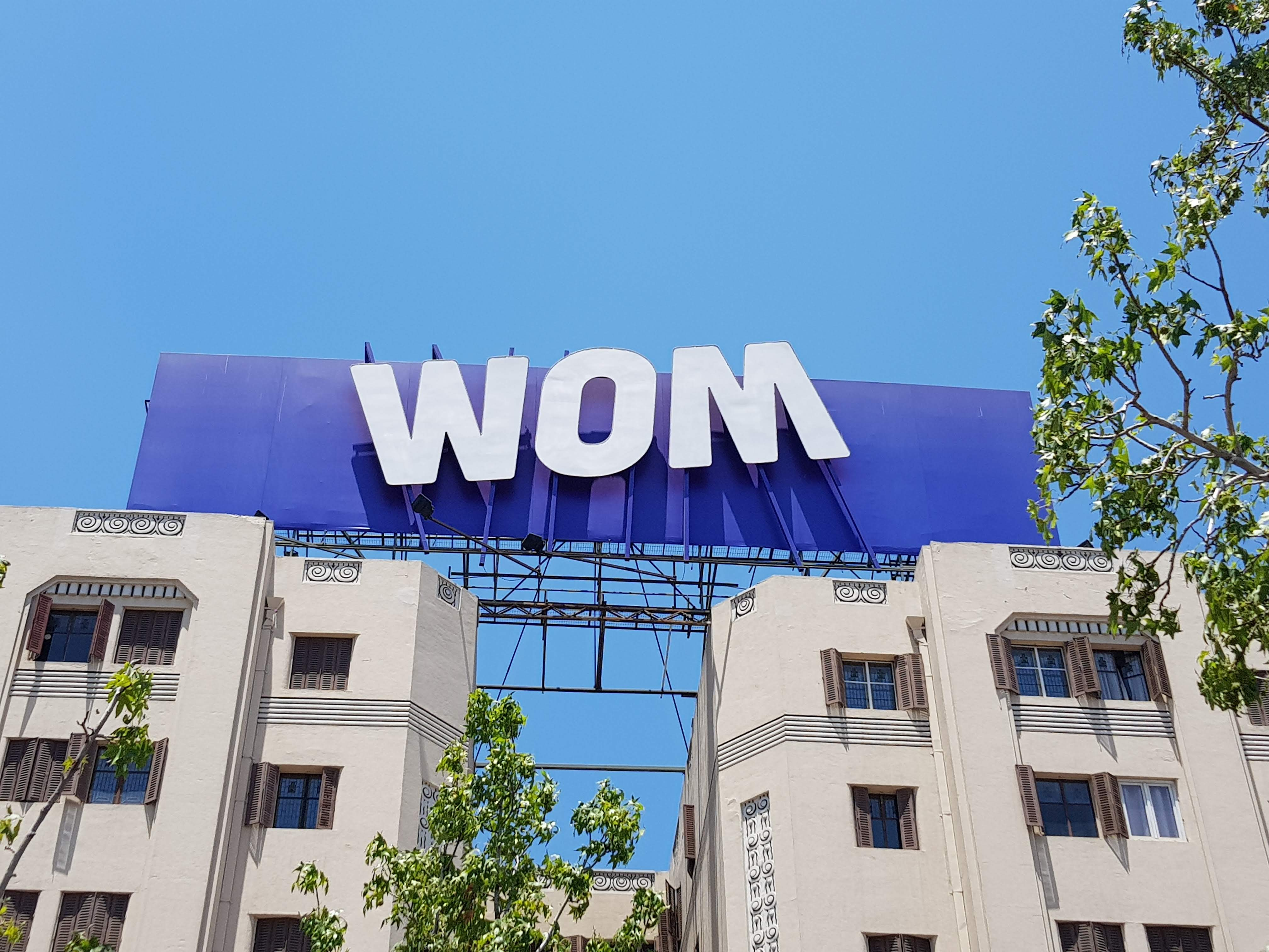 Publicidad de la compañía WOM ubicada frente a Plaza Baquedano